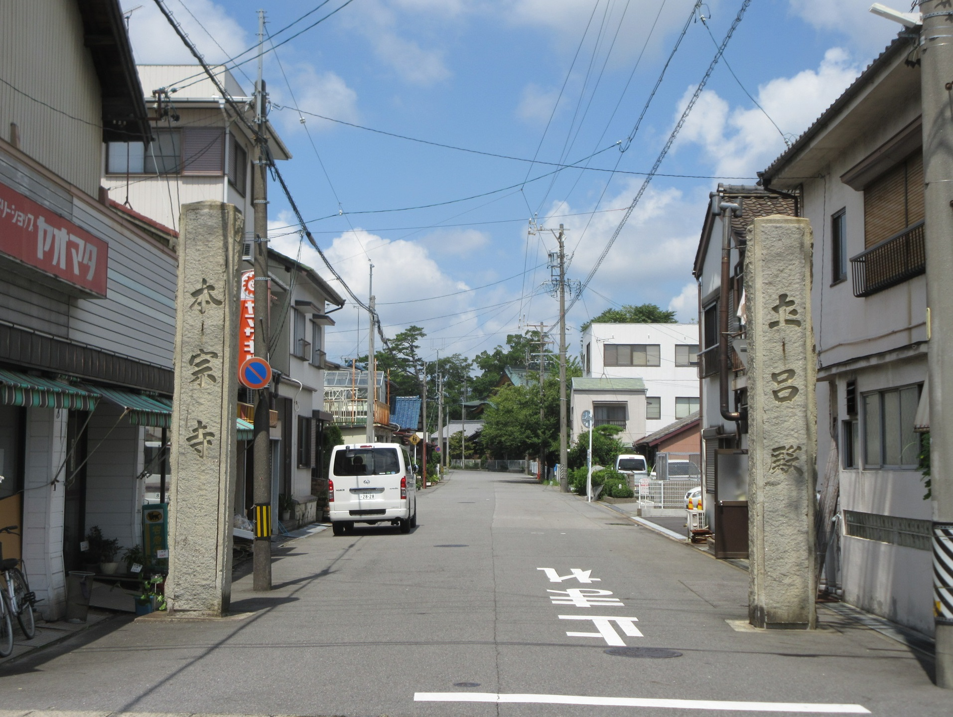 本宗寺の石門